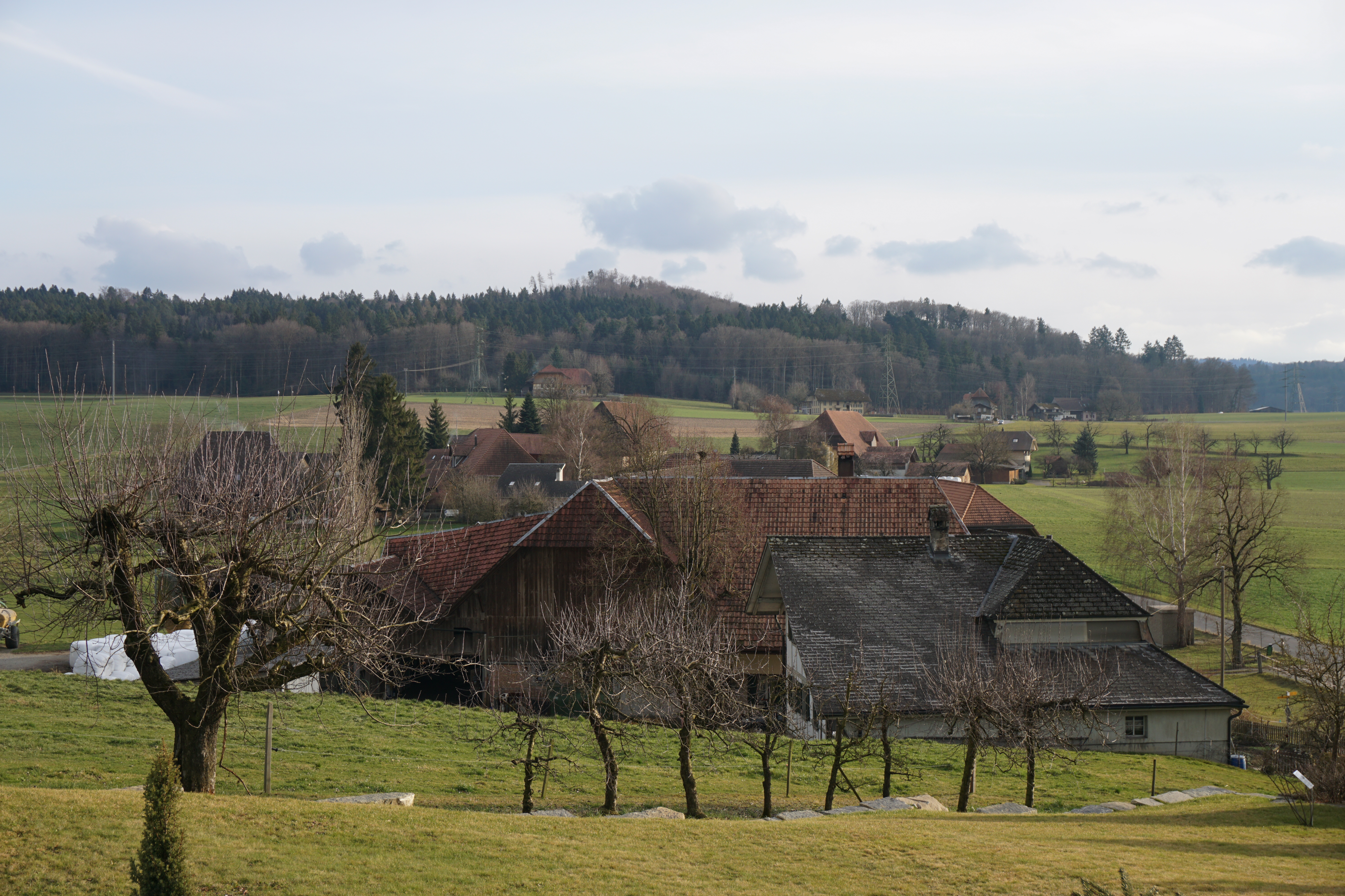 Rüti bei Lyssach, Bauernhöfe